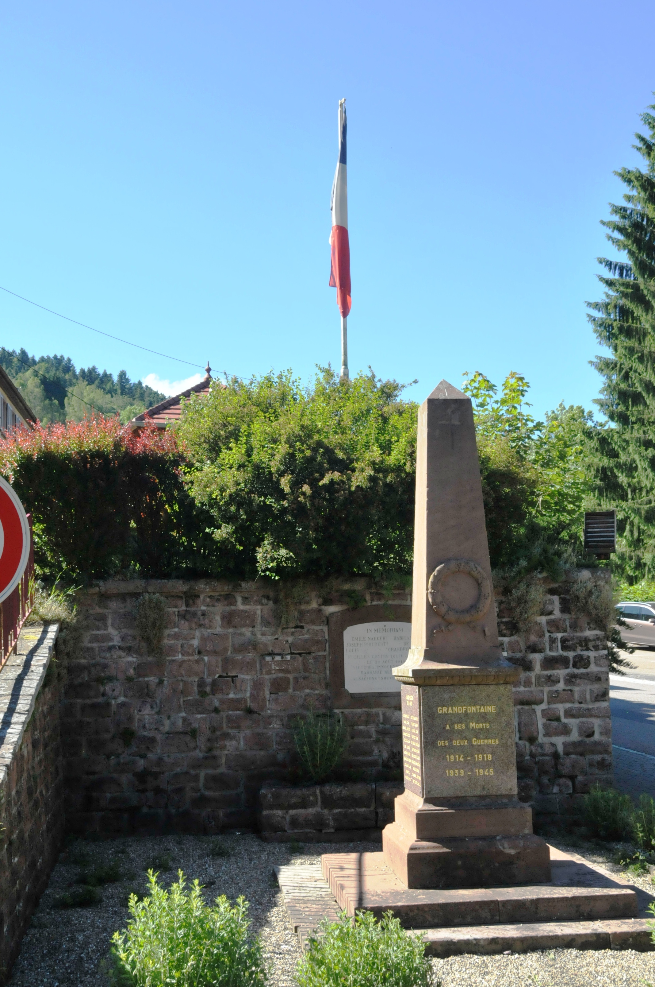 Grandfontaine, Kriegsgefallenendenkmal